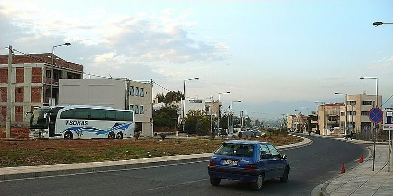 Panagouli Avenue